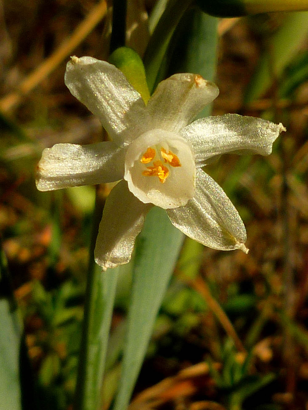 Narcissus tortifolius en Peñas Blancas, Cartagena (España).